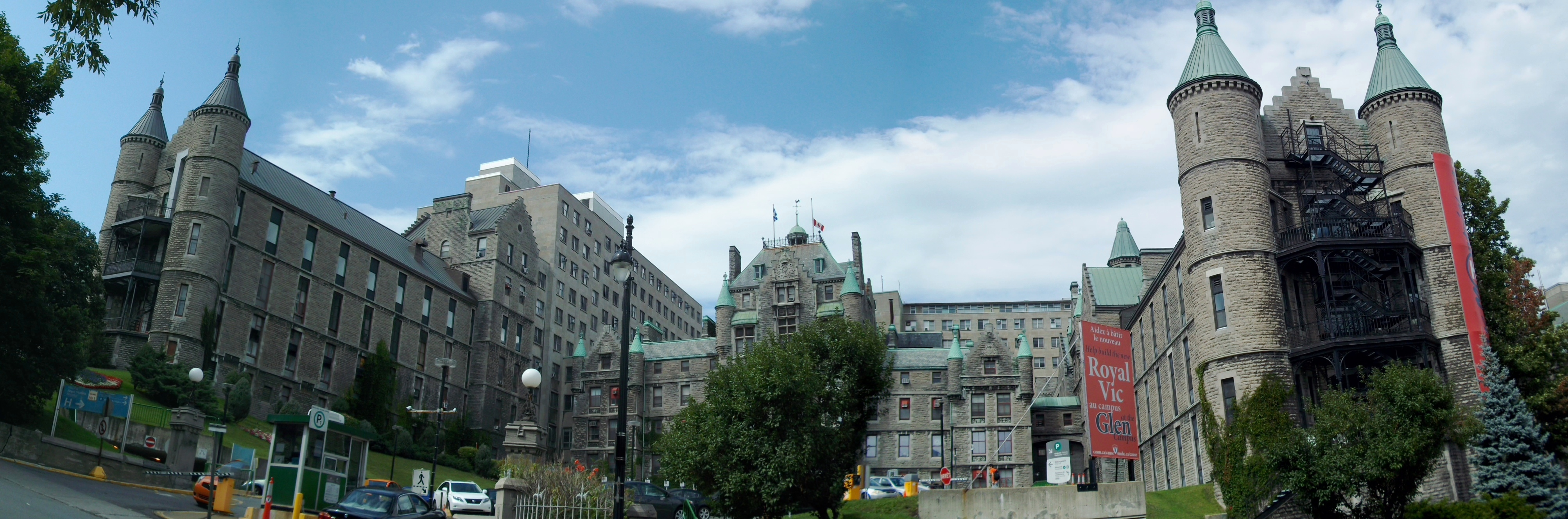 Hôpital Royal Victoria, 687, avenue des Pins Ouest, Montréal (info)